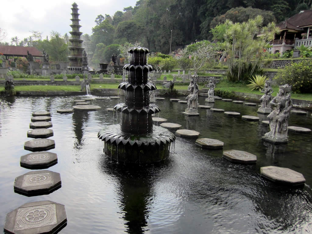 Taman Tirta Gangga, a water palace on eastern Bali